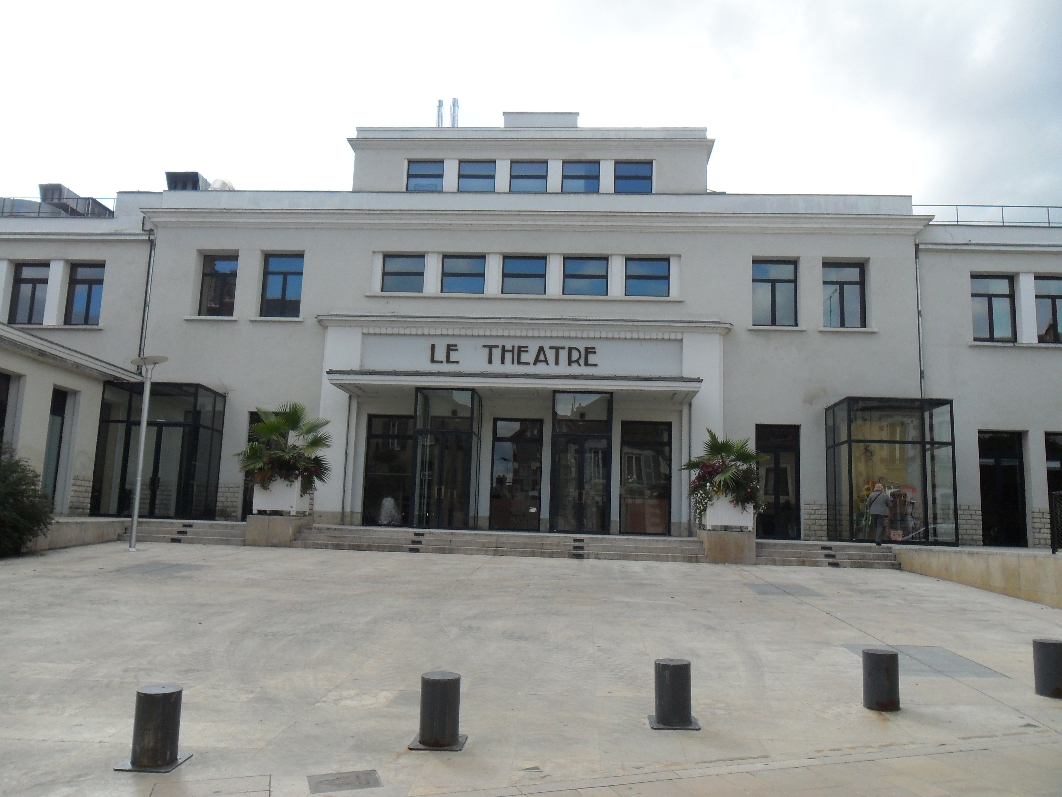 Le théatre d'Auxerre